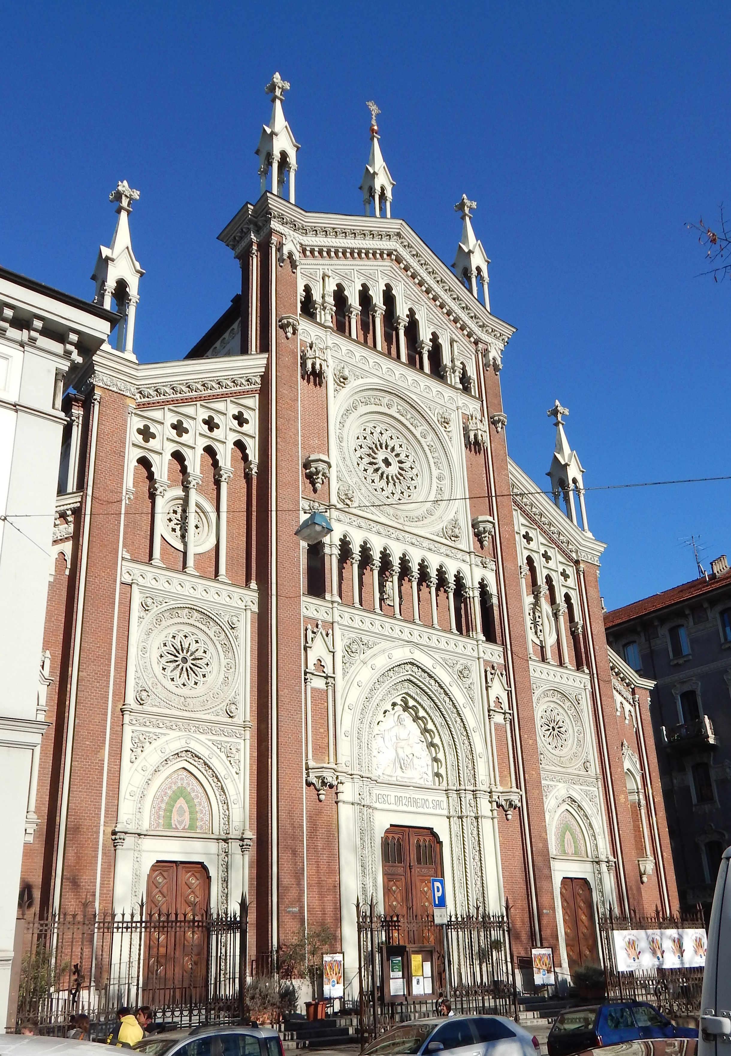 Una veduta del quartiere torinese Cit Turin: la chiesa di Gesù Nazareno.